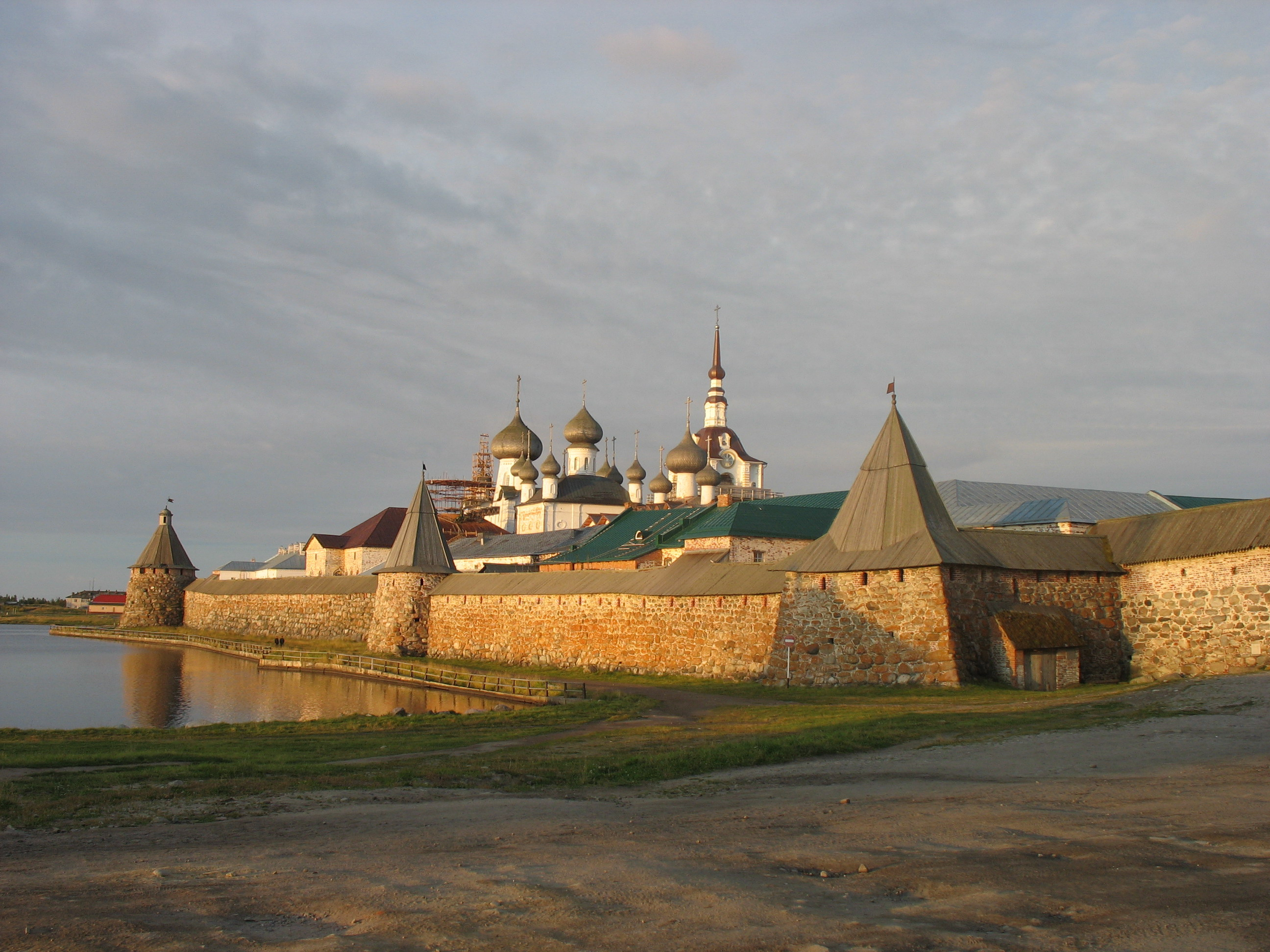 Соловецкий монастырь: крепость, храмовый комплекс